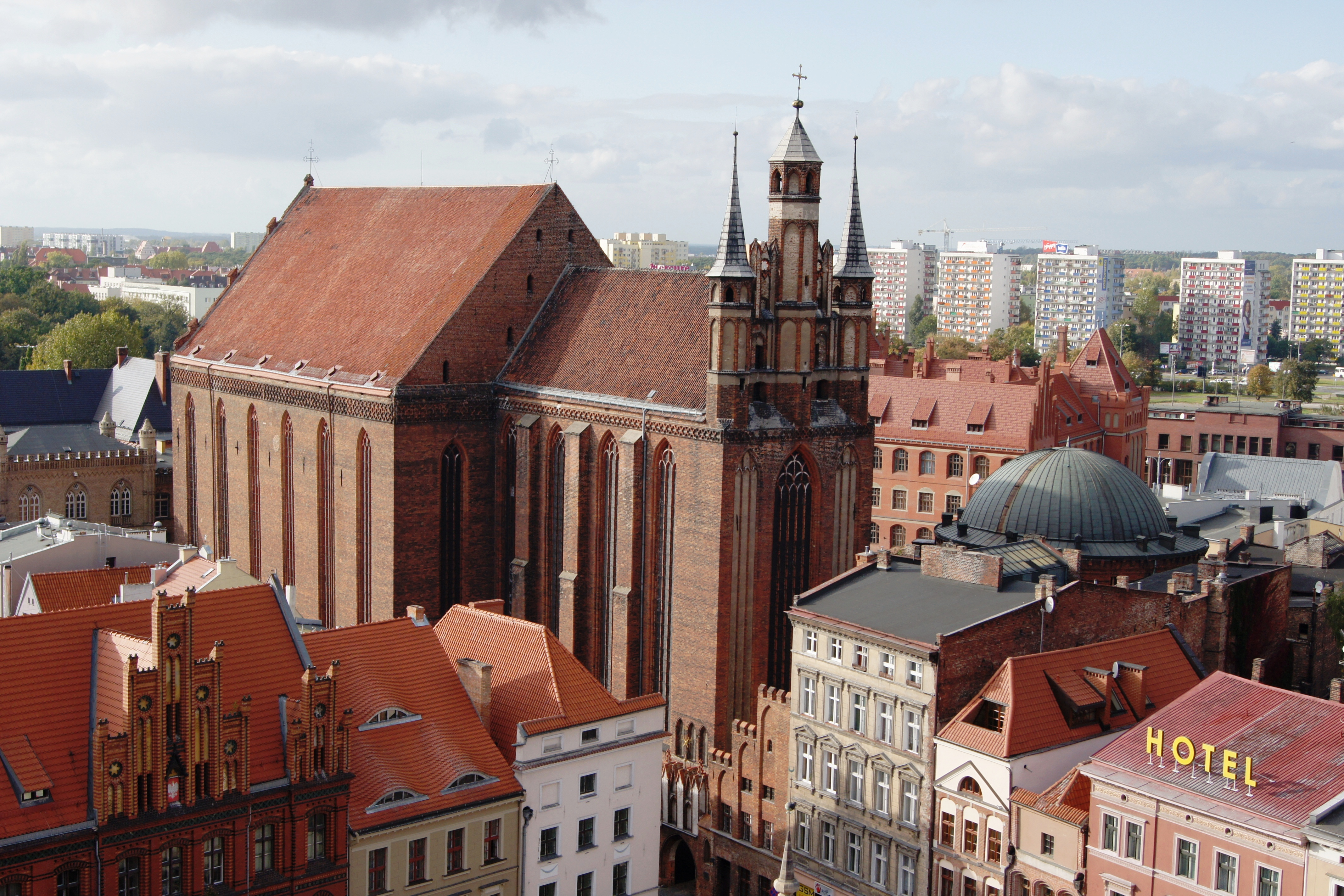 Toruń Stare Miasto - dawny kościół klasztorny, obecnie Kościół parafialny pw. Wniebowzięcia NMP (zabytek nr A/406 z 24.10.1929)